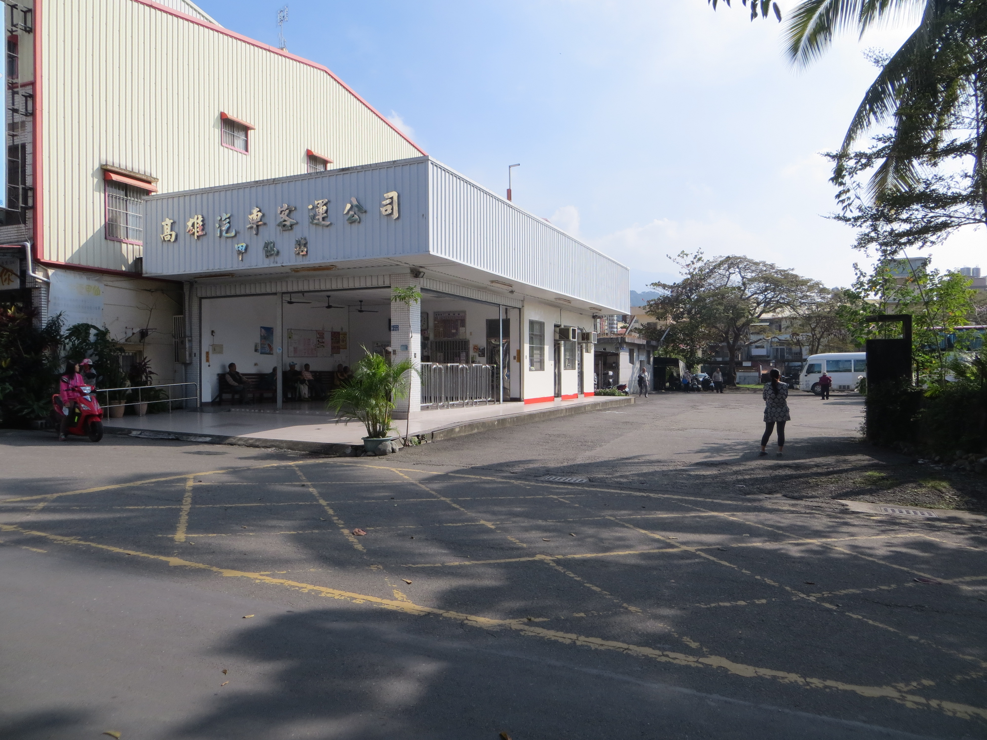 高雄市甲仙區高雄客運甲仙站，臨林森路一端，自本站出發之班次皆經此開出；左側通往台29線，右側為調度場。站點主建築設候車室、售票處，現已改由車上收費。2016年1月9日